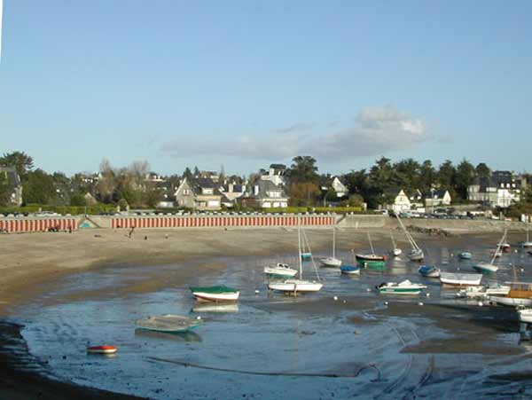 la plage du Béchet et ses cabines